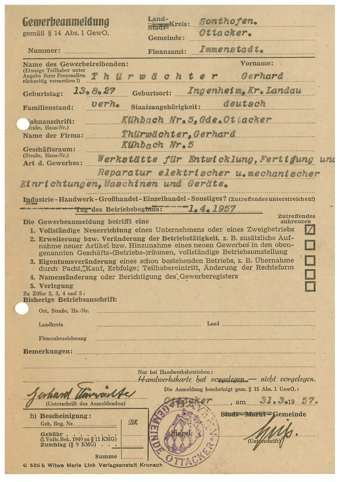 Gewerbeanmeldung